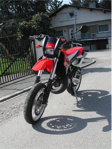 Foto di aprilia mx, di pubblico dominio